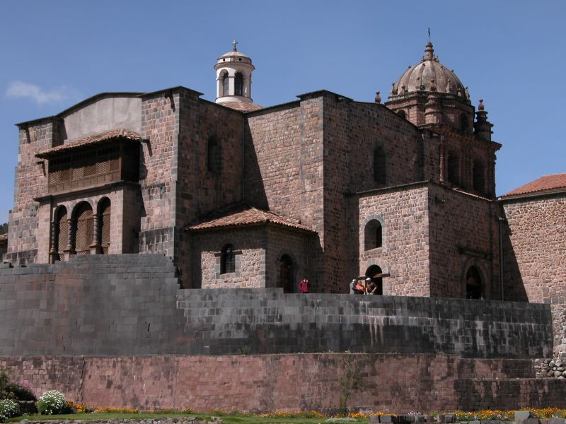 Koricancha - Cusco, Peru